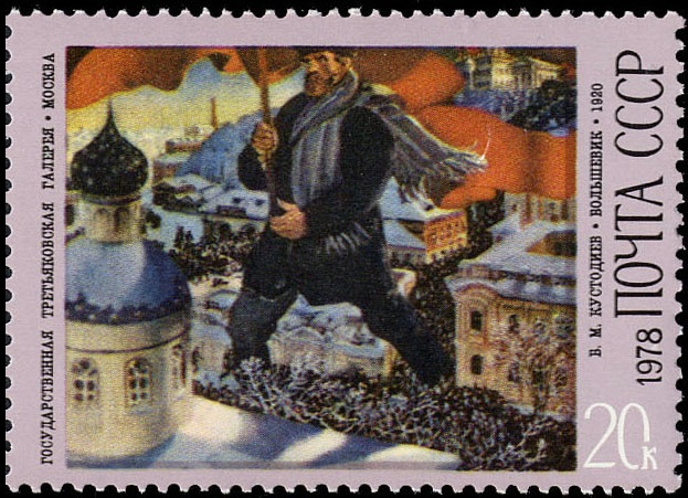 Б. М. Кустодиев. «Большевик». 1920 г.